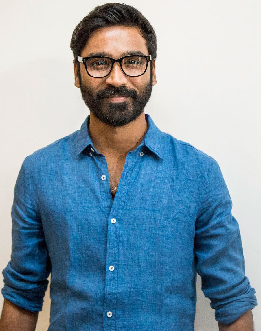 Dhanush at Mudinja Ivana Pudi Audio Launch